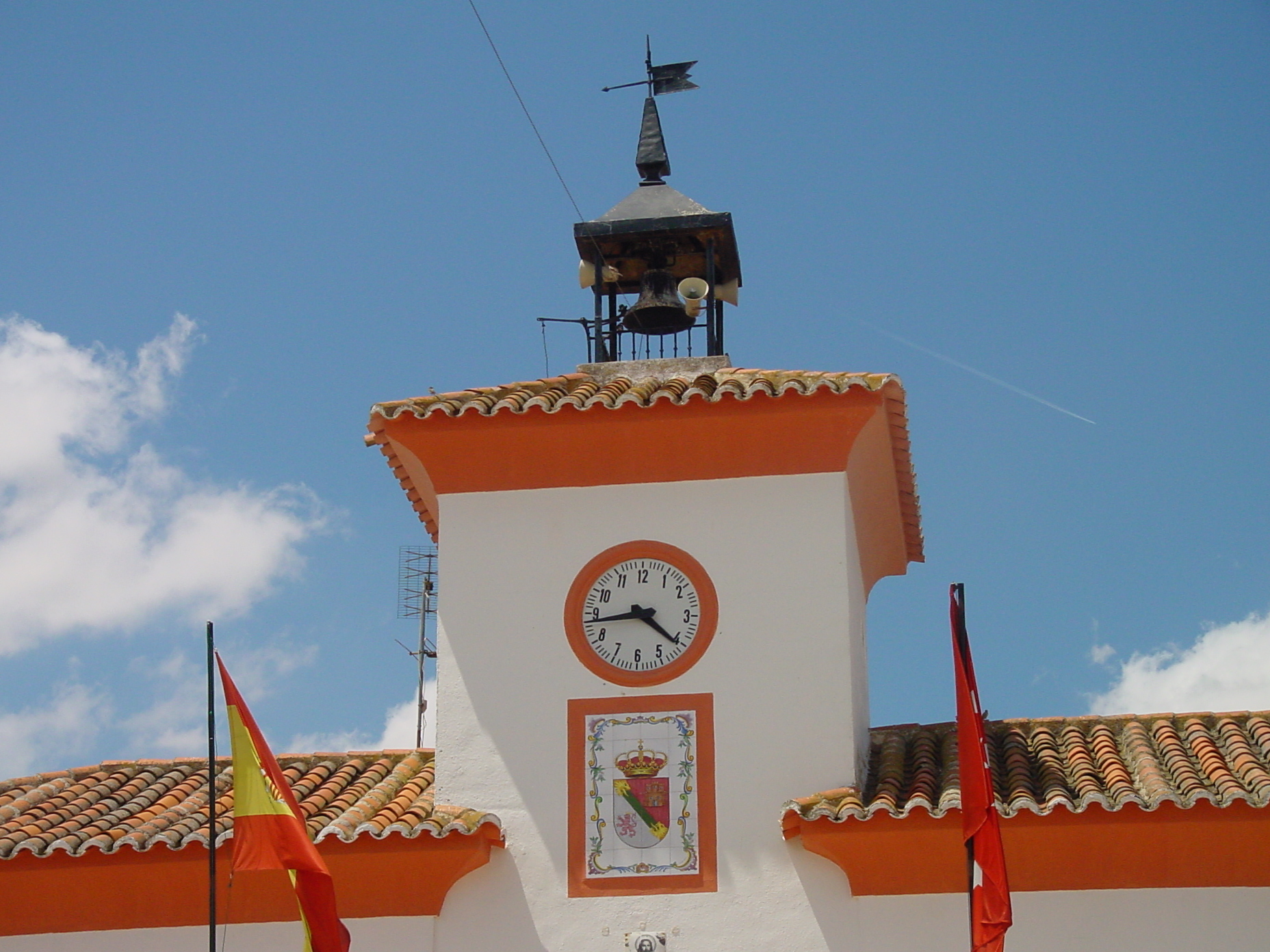 Torre del ayuntamiento en Villamanrique de Tajo.